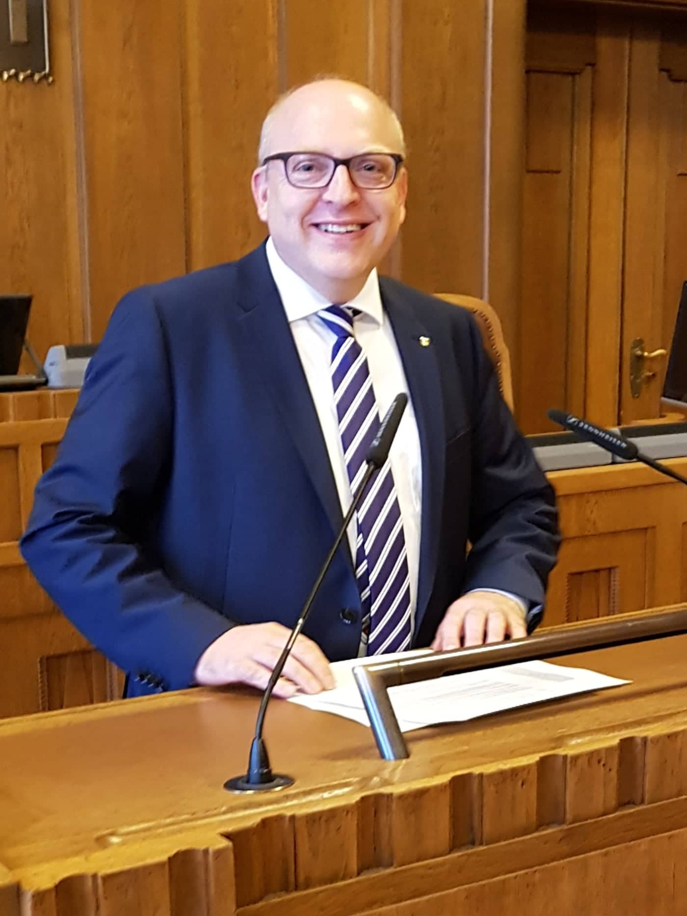 Kämmerer Sven Schulze leitet den Stadtrat in Vertretung der Oberbürgermeisterin.